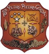 Stemma municipio Cuatemoc